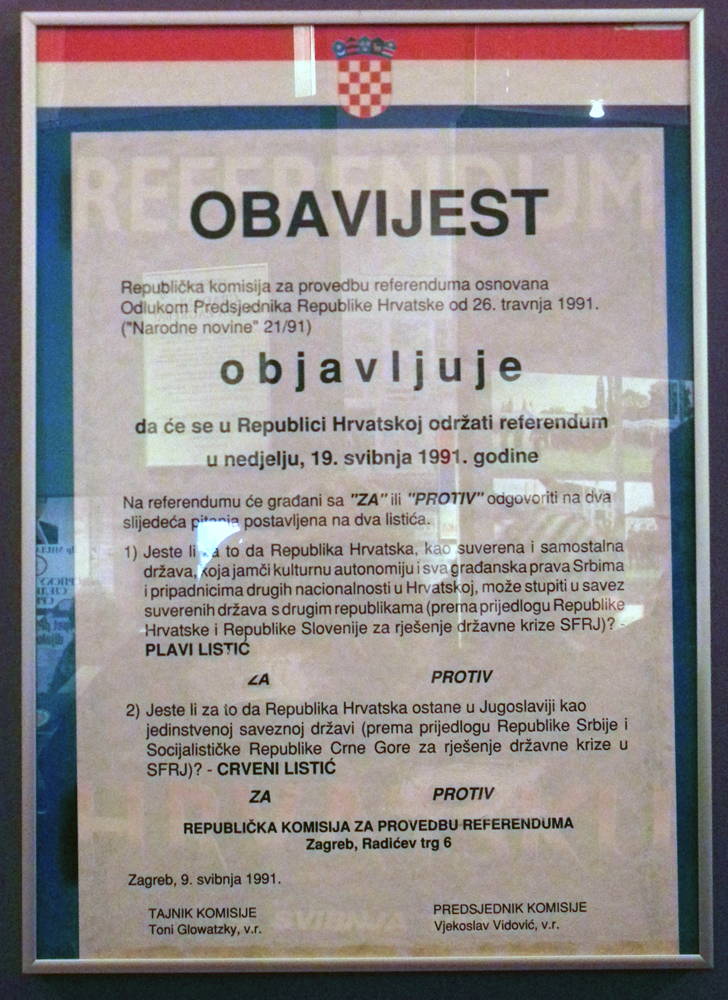 Izložba Domovinski rat u Hrvatskom povjesnom muzeju tijekom Noći muzeja.